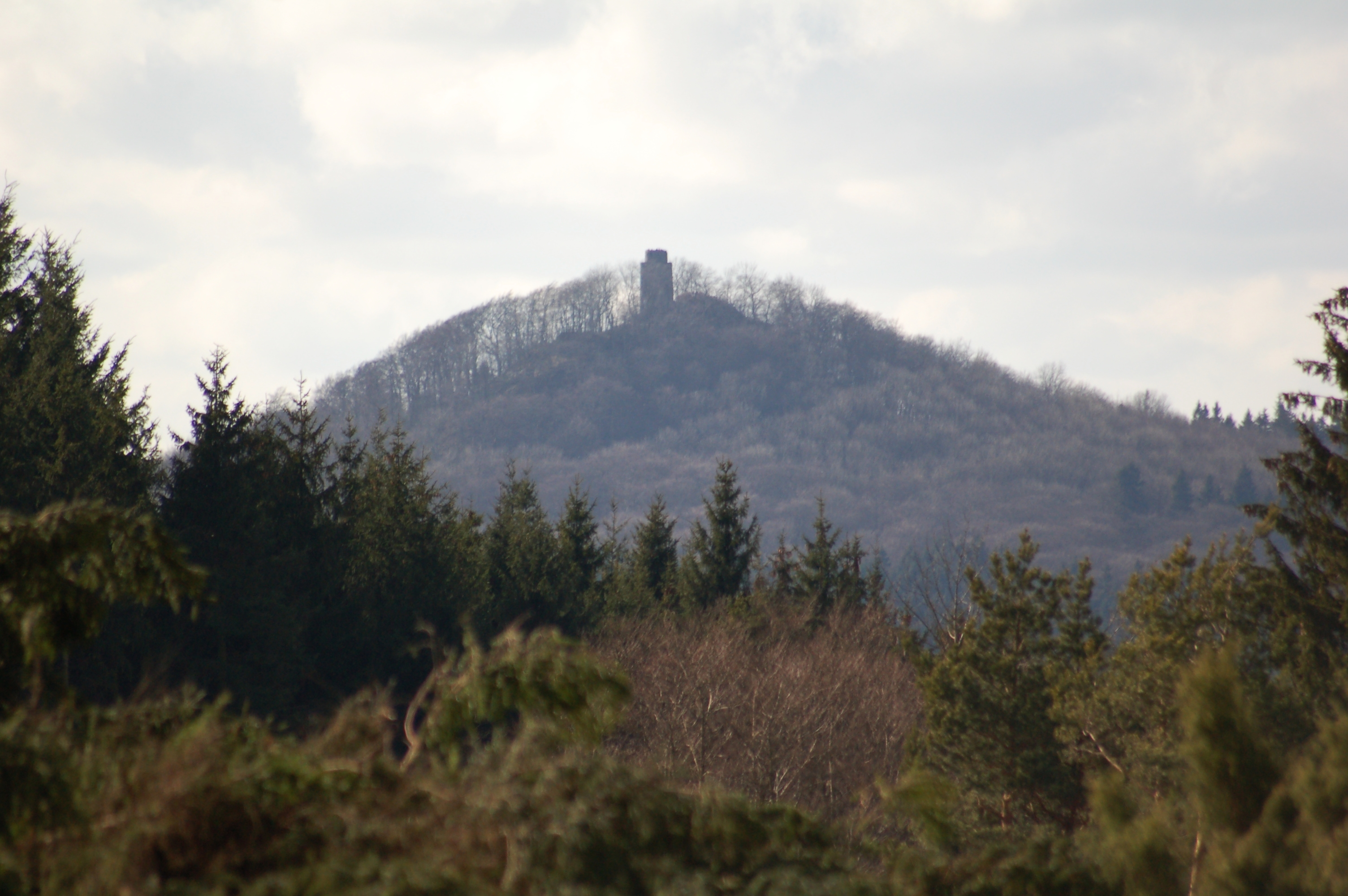 Hohe Acht vom Gipfelplateau des Raßberges aus fotografiert